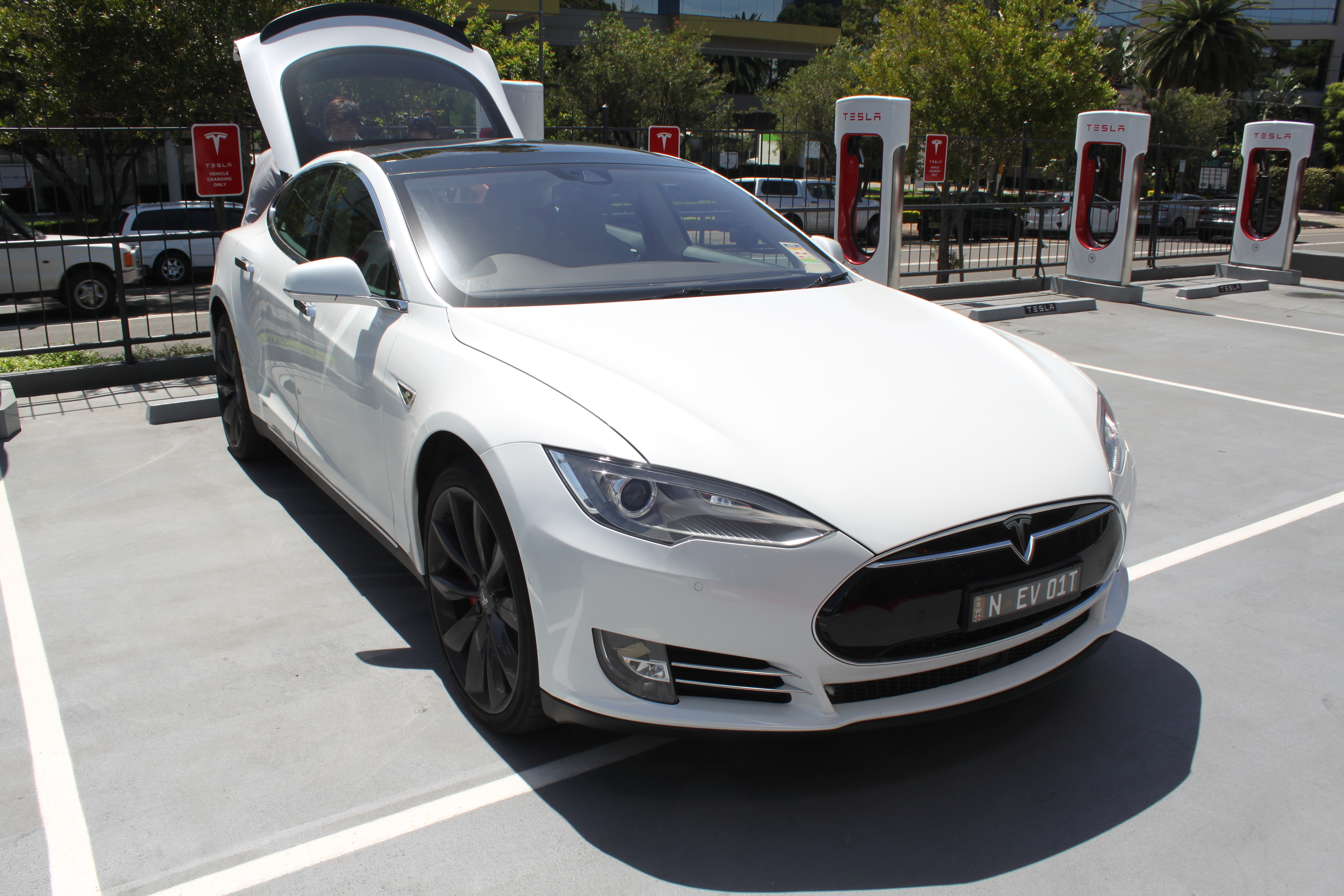 Tesla Model S P90D